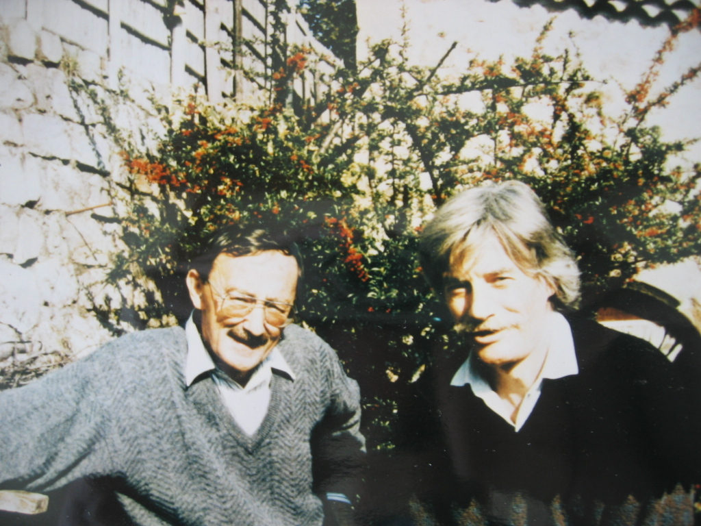 Le chanteur Jean Ferrat (à droite) et son ami le poête et parolier Guy Thomas